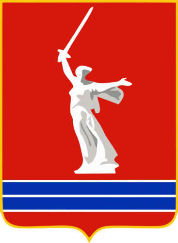 Герб Волгоградской области — основная форма (малый герб)